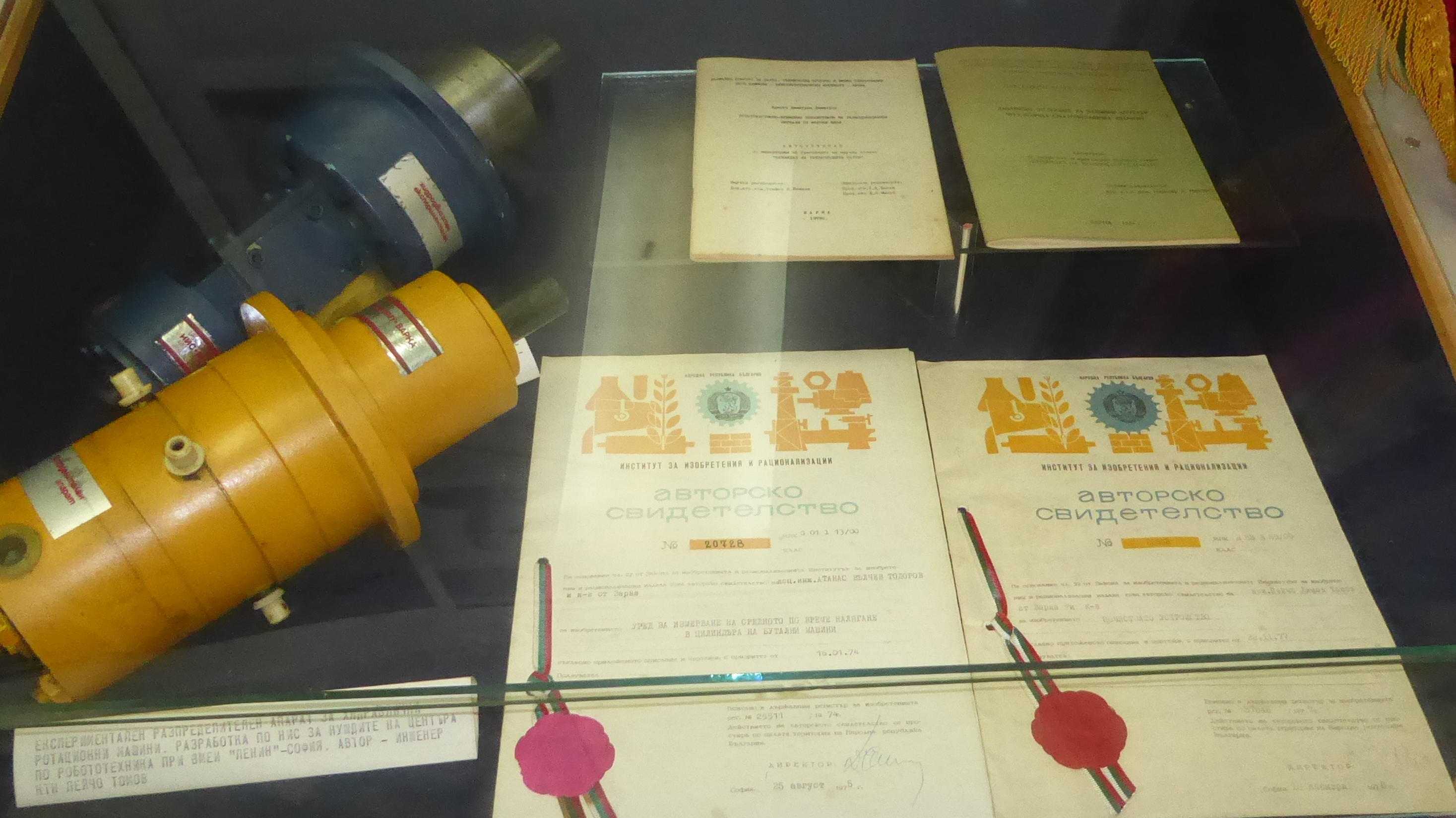 Marineakademie Warna-Erfindungen und Rationalisierungen